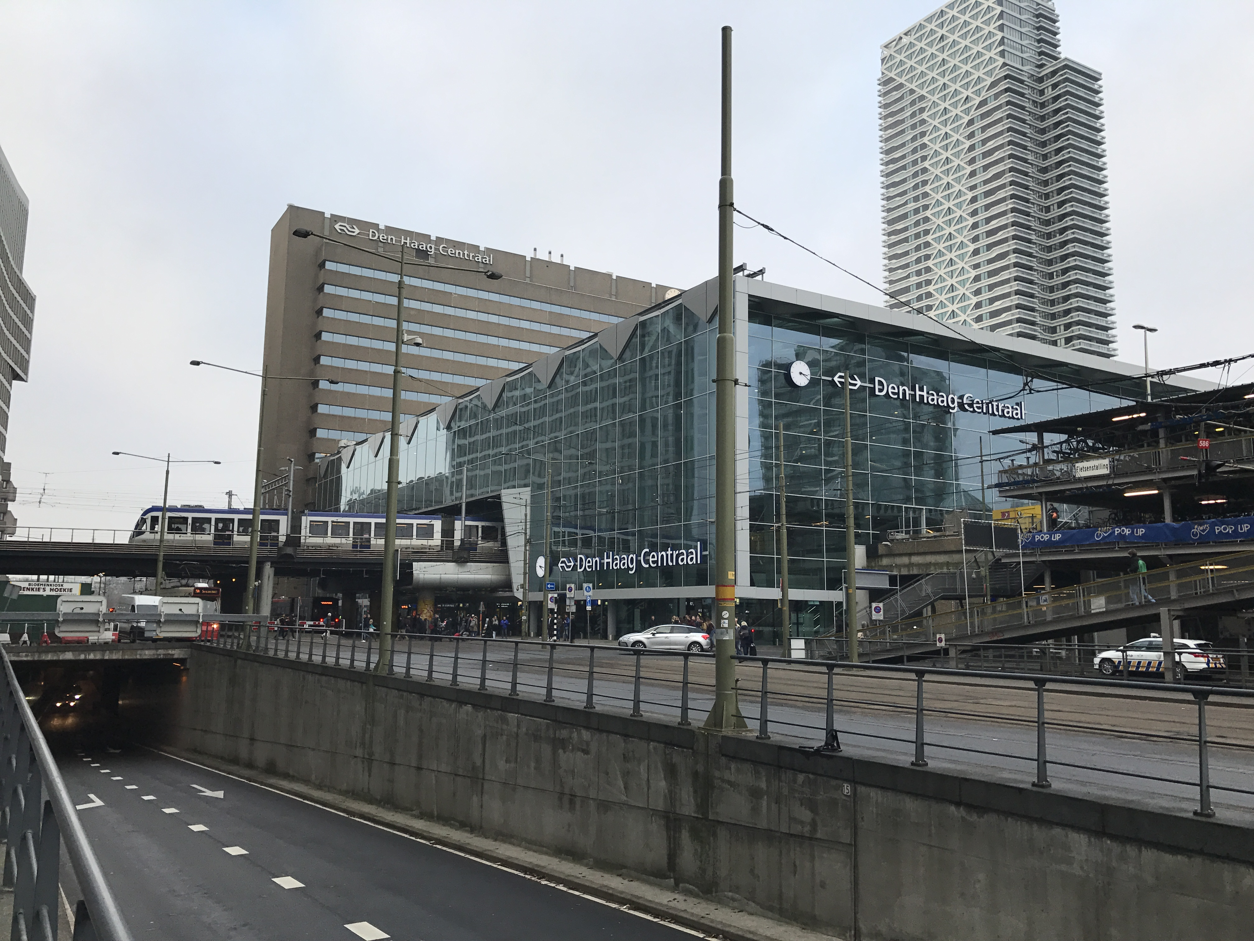 De voorkant van station Den Haag Centraal bij de Rijnstraat in 2017.